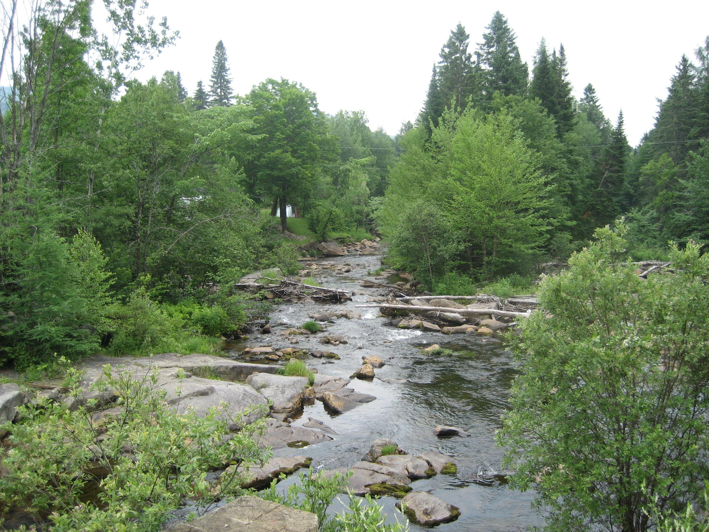 Rivière Huron à Stoneham Québec Canada